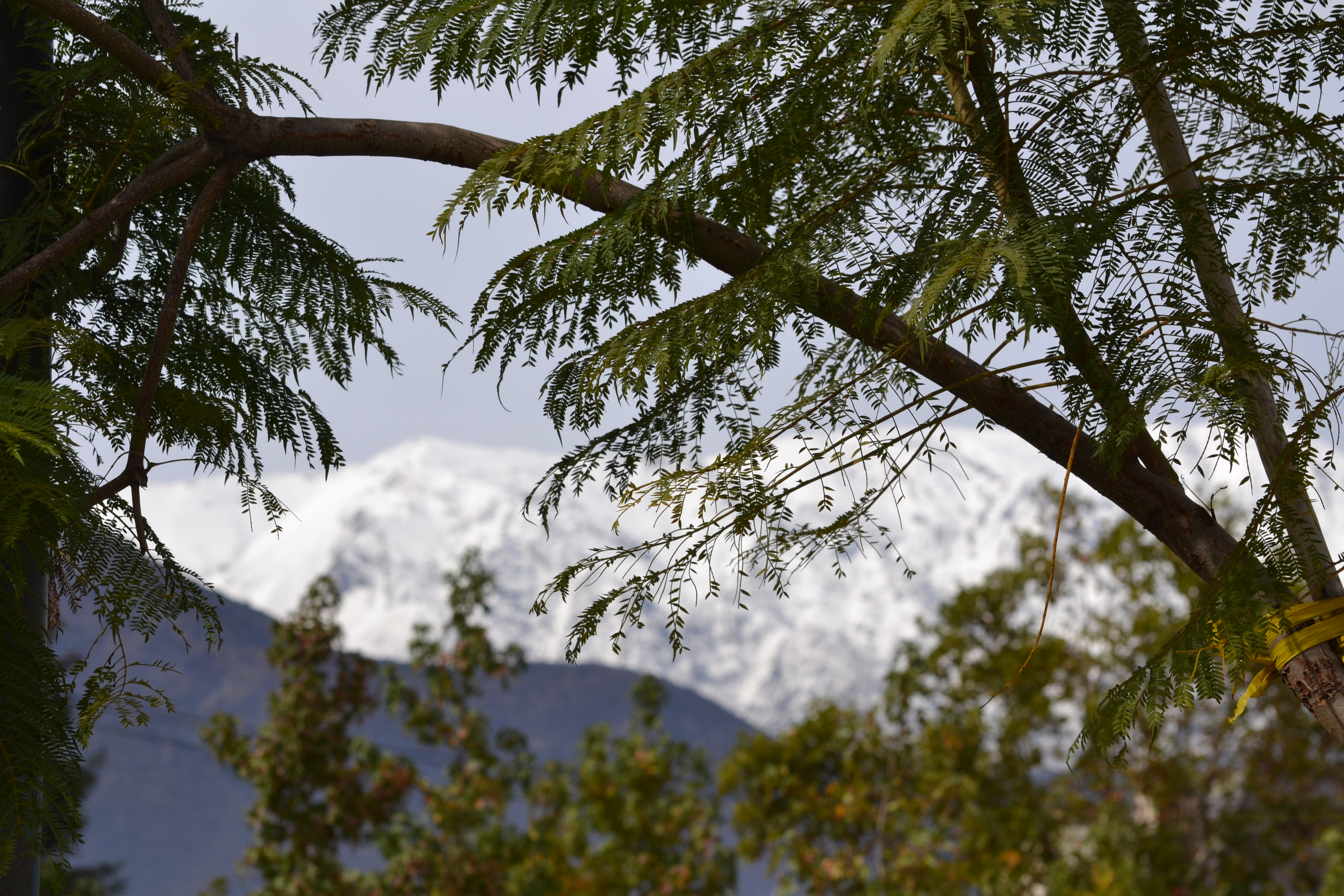 Profundidad de campo